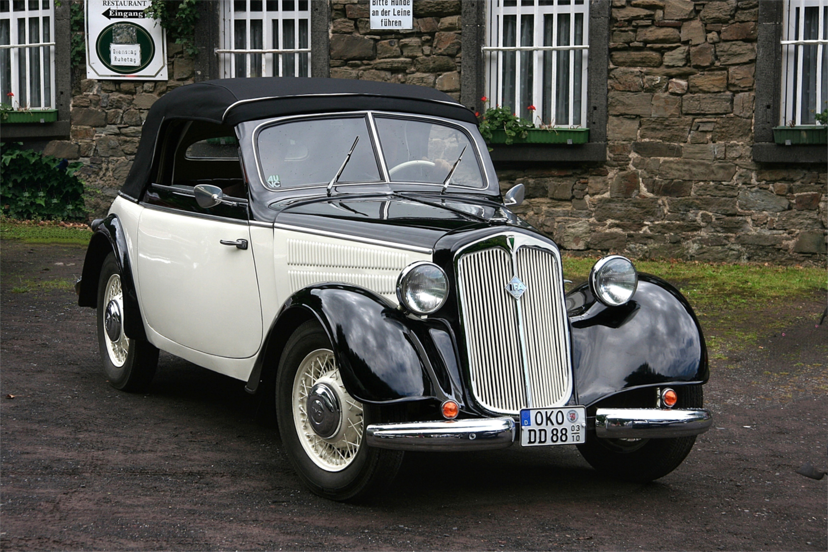 DKW-IFA (F8), 690 cm³, 20 PS, Bj. 1954 (Kennzeichen verändert)